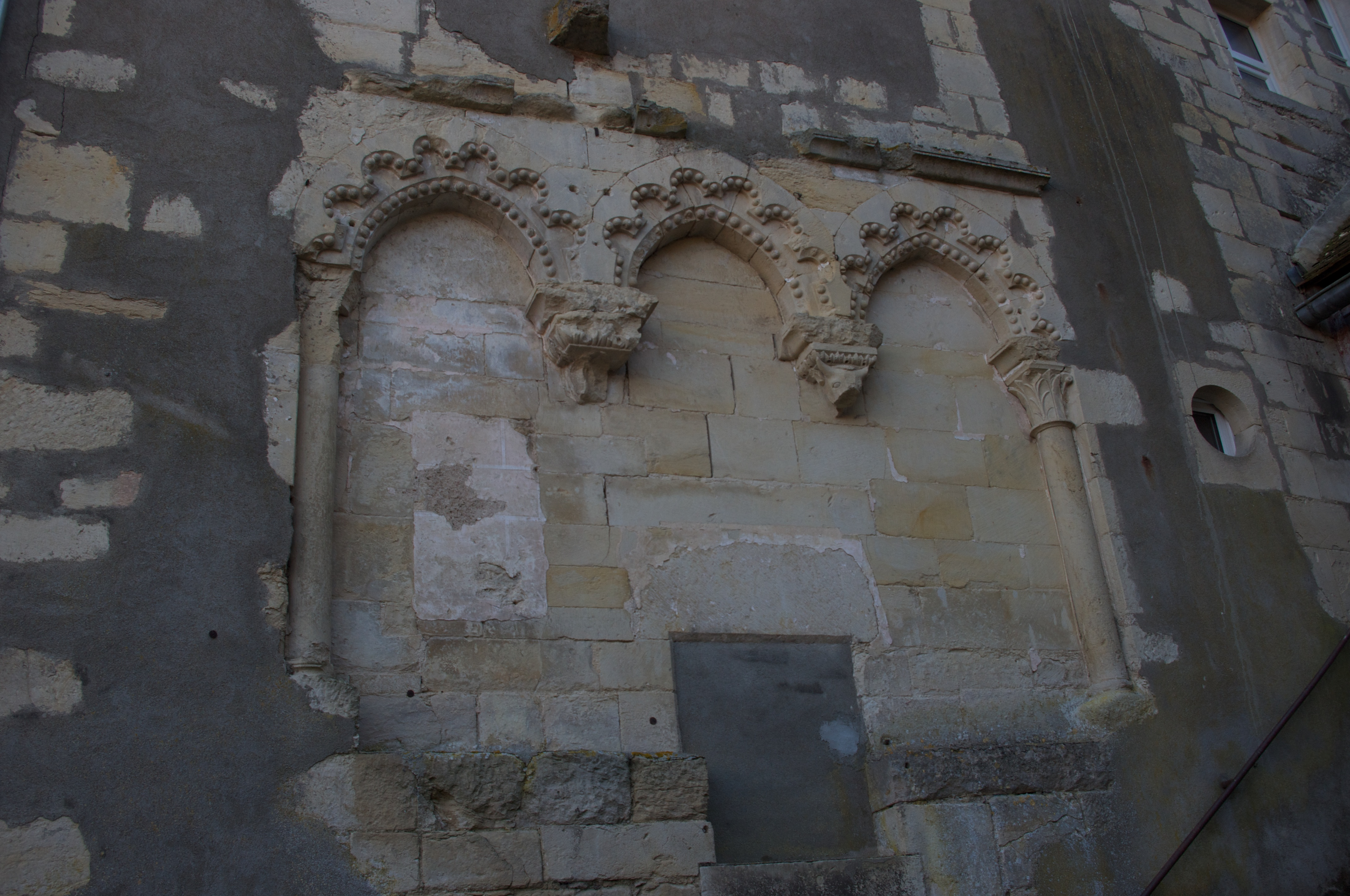 Restes de l'église Sainte-Eugénie, située immédiatement au sud-ouest du bassin des lavoirs. Vue depuis le lavoir situé à l'est du bassin (à gauche en arrivant de la rue Saint-Pierre).